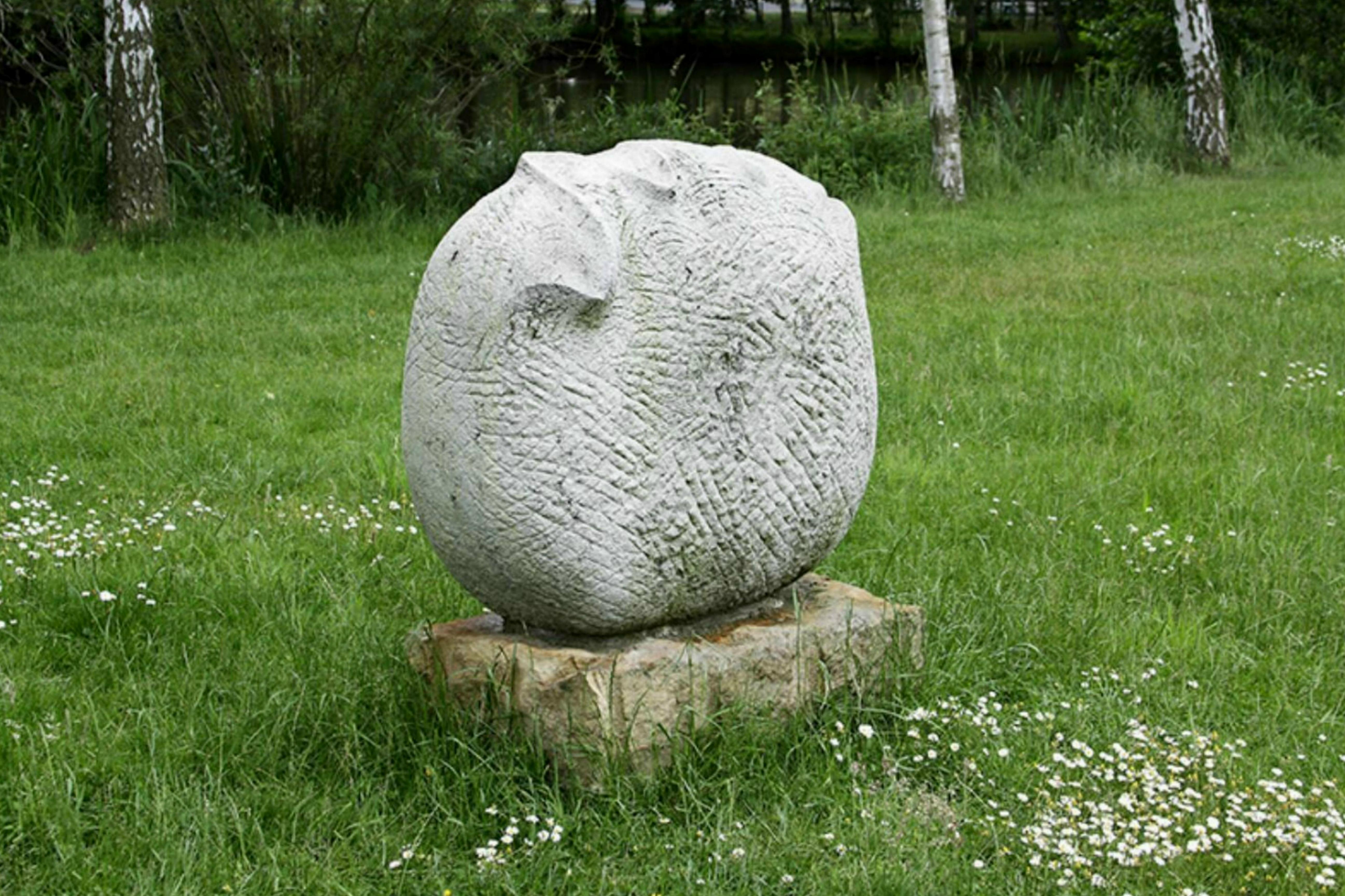 Berührung (Eva Backofen)